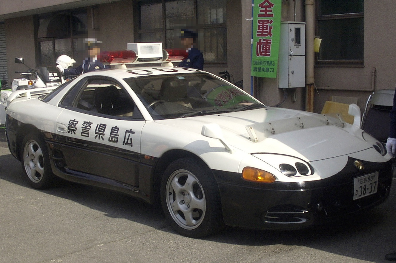 三菱GTOパトカー